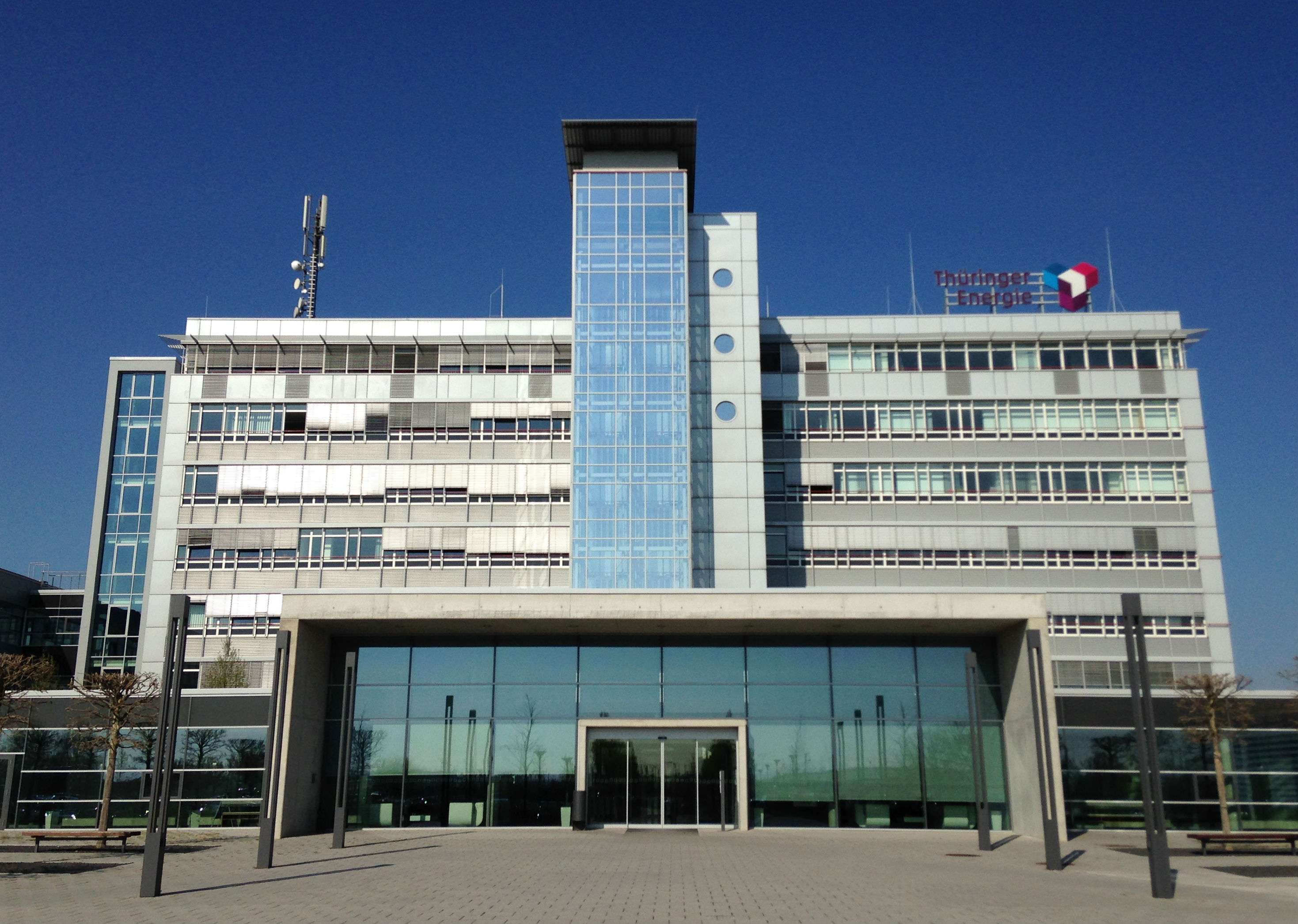 Hauptsitz der Thüringer Energie in Erfurt-Schwerborn